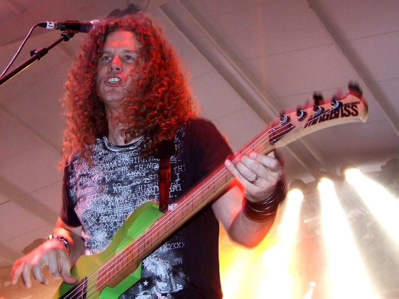 House Of Lords. Lorca Rock Festival (Lorca, Murcia), 18/06/2006